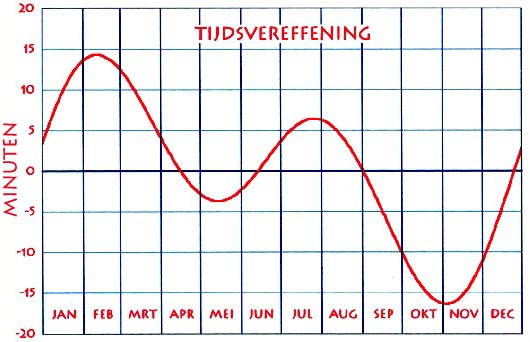 Het verloop van de tijdsvereffening over de periode van een jaar